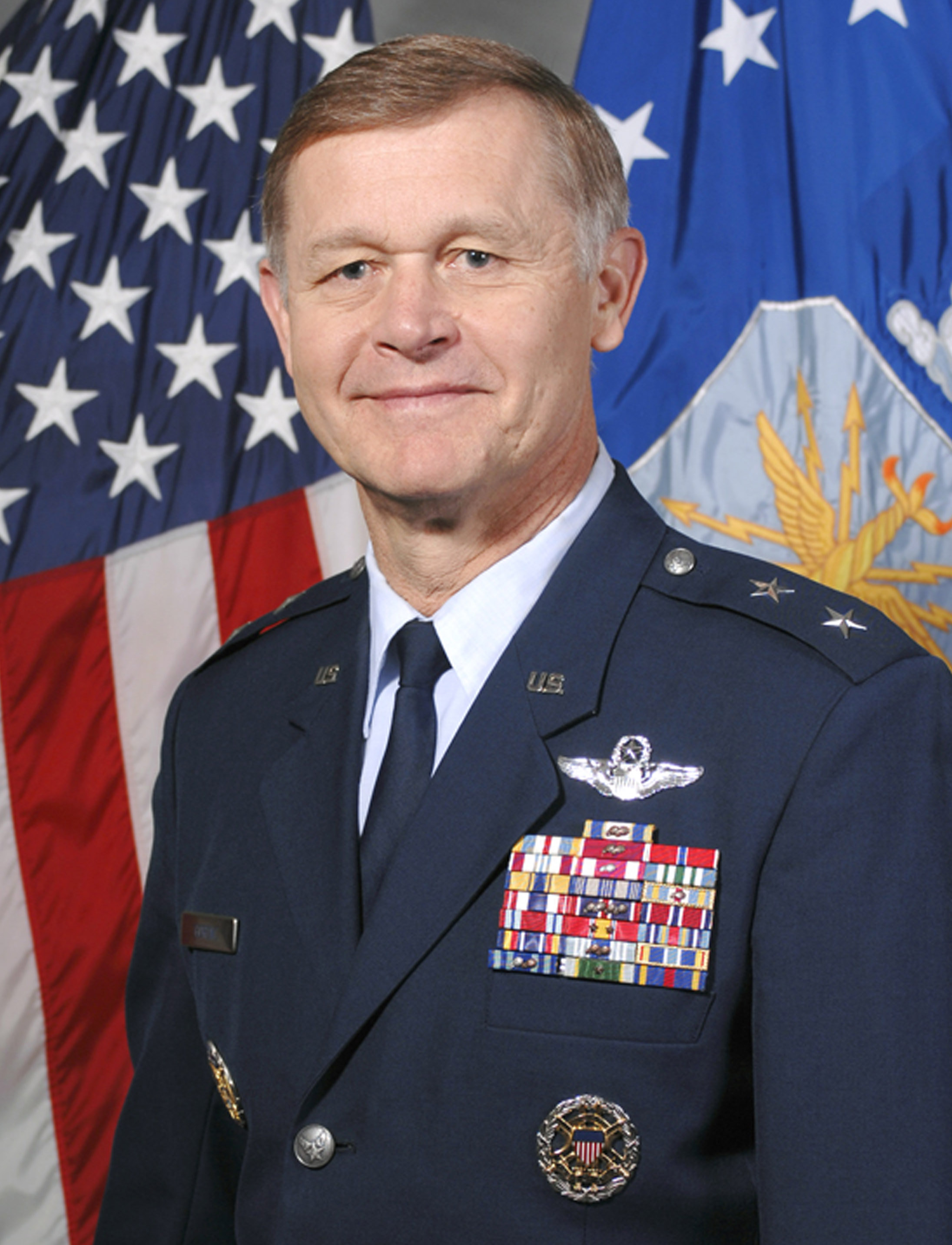 Stanley Gorenc.